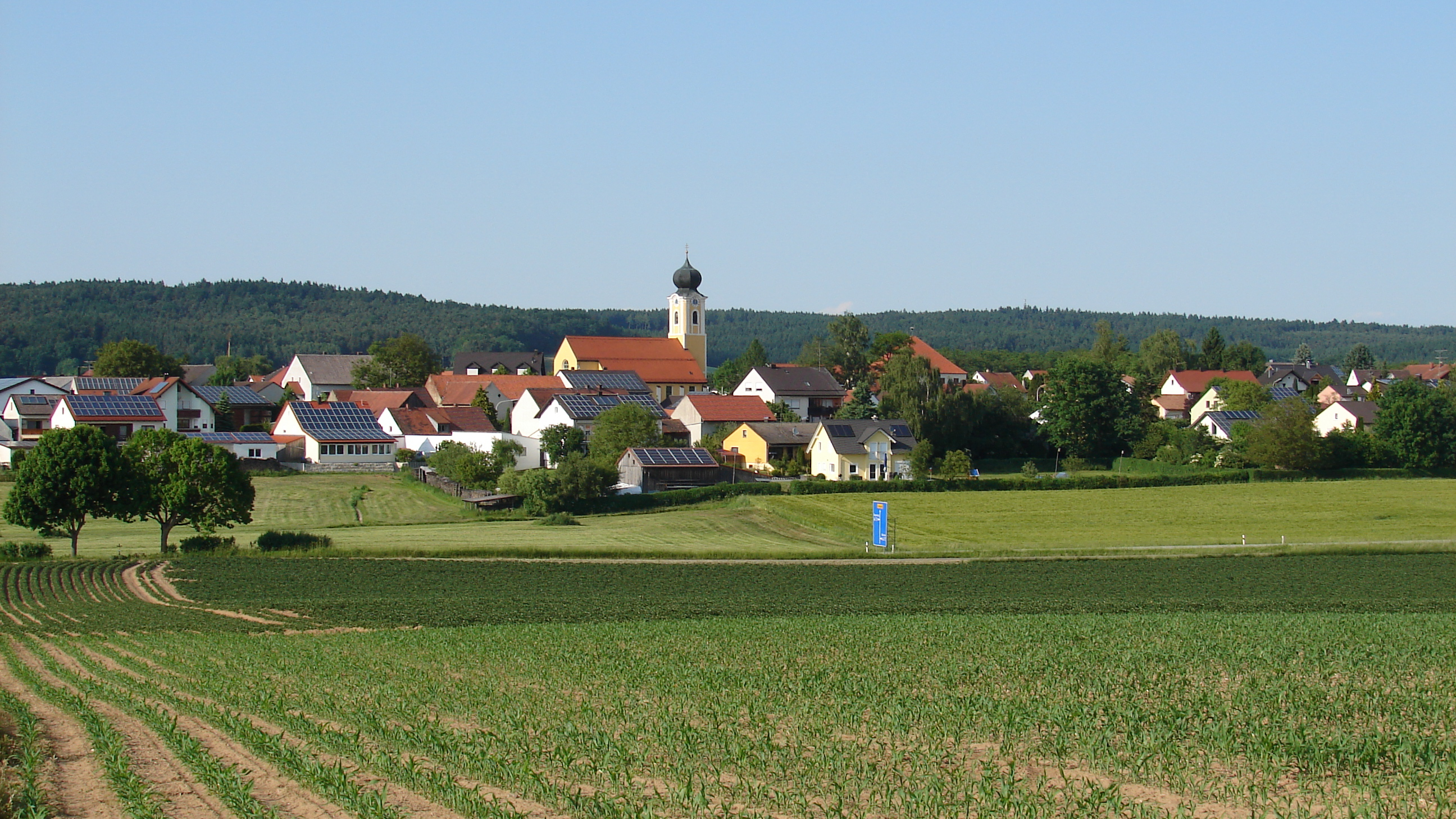 Hausen ist eine Gemeinde im niederbayerischen Landkreis Kelheim und ein Mitglied der Verwaltungsgemeinschaft Langquaid.